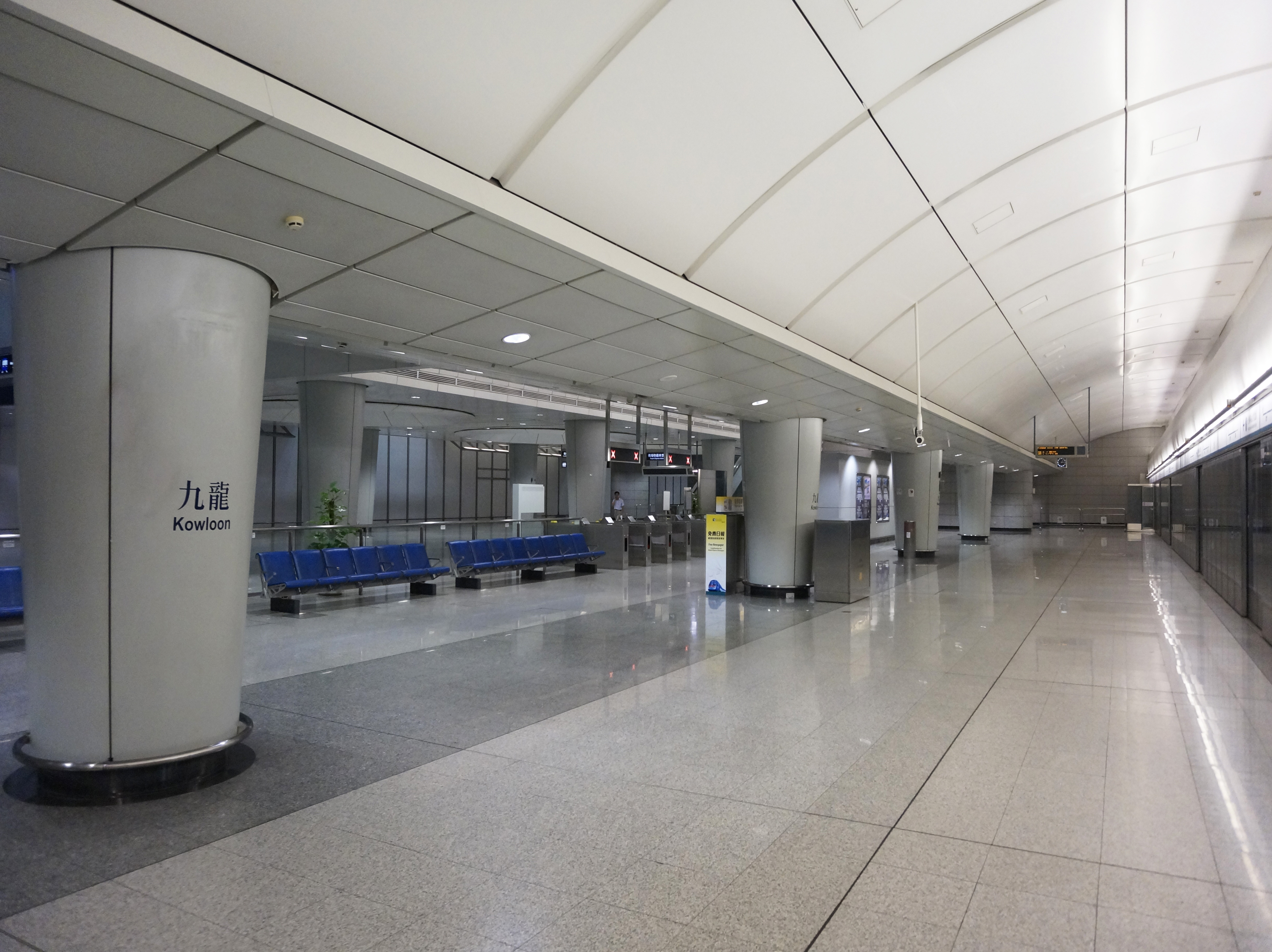 港鐵九龍站月台